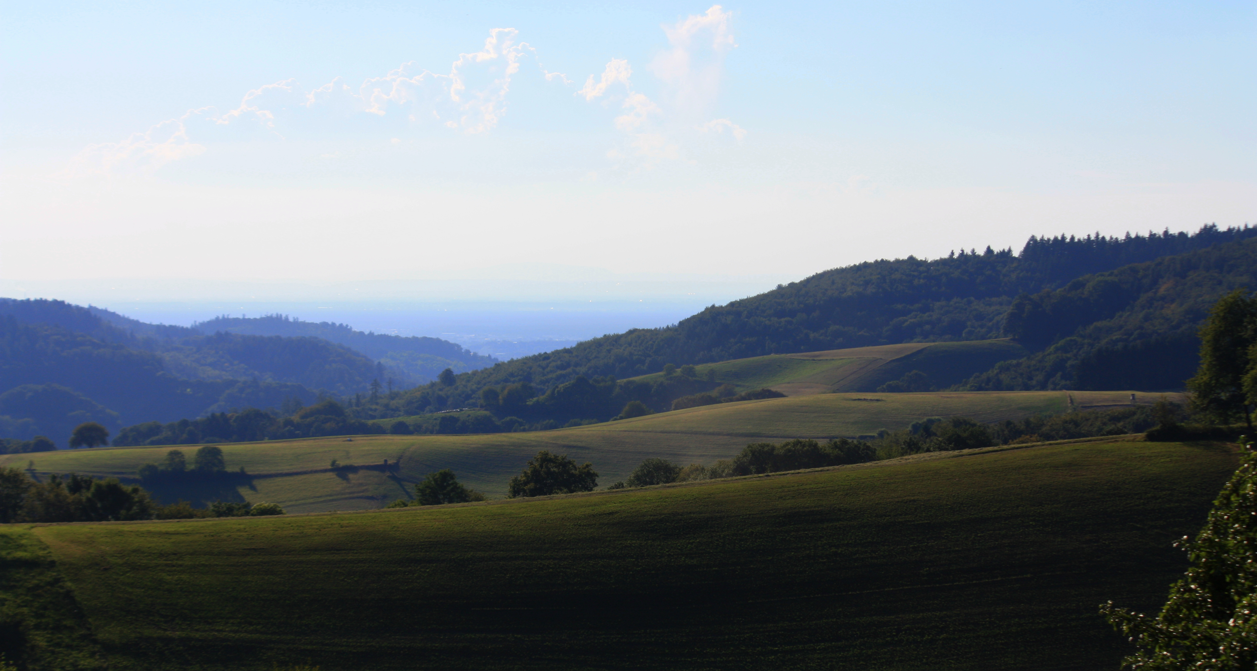 Panorama